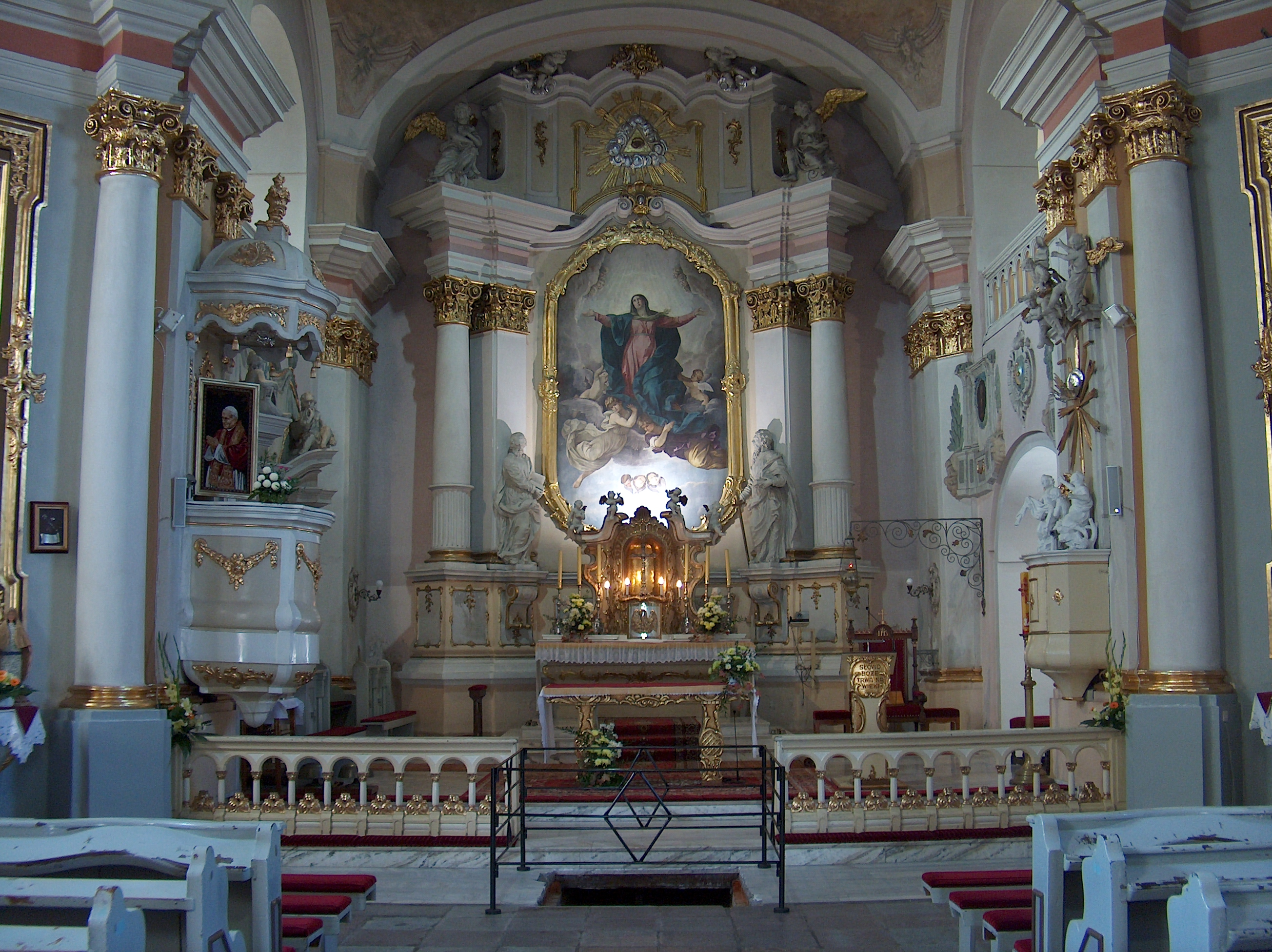 Zbąszyń, kościół par. p.w. Wniebowzięcia NMP, mur., XVIII